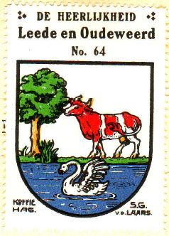 Coat of arms of Leede en Oudewaard (Netherlands)